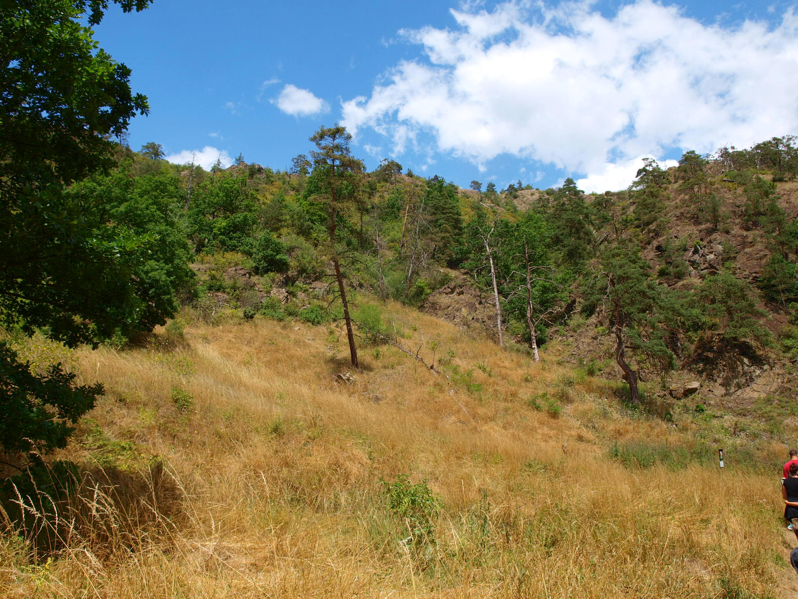 Mohelská hadcová step